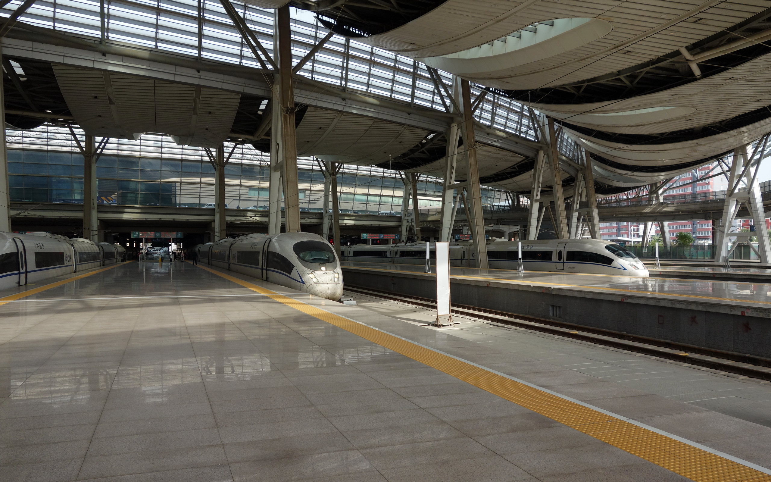 北京南站站台